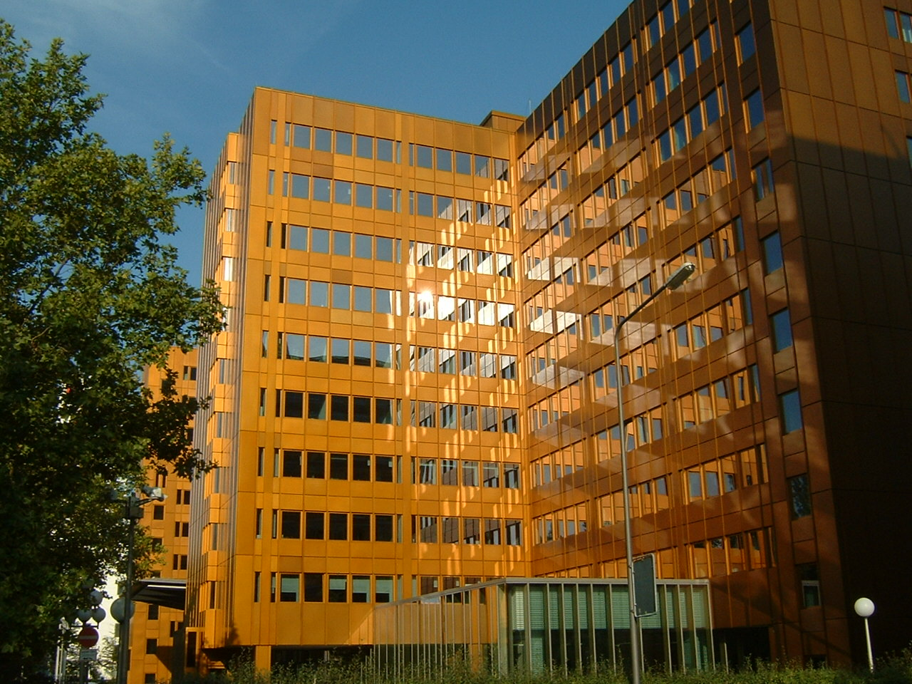 Commerzbank Systems, Gebäude auch Goldenes Haus genannt; Frankfurt Theodor Heuß Allee